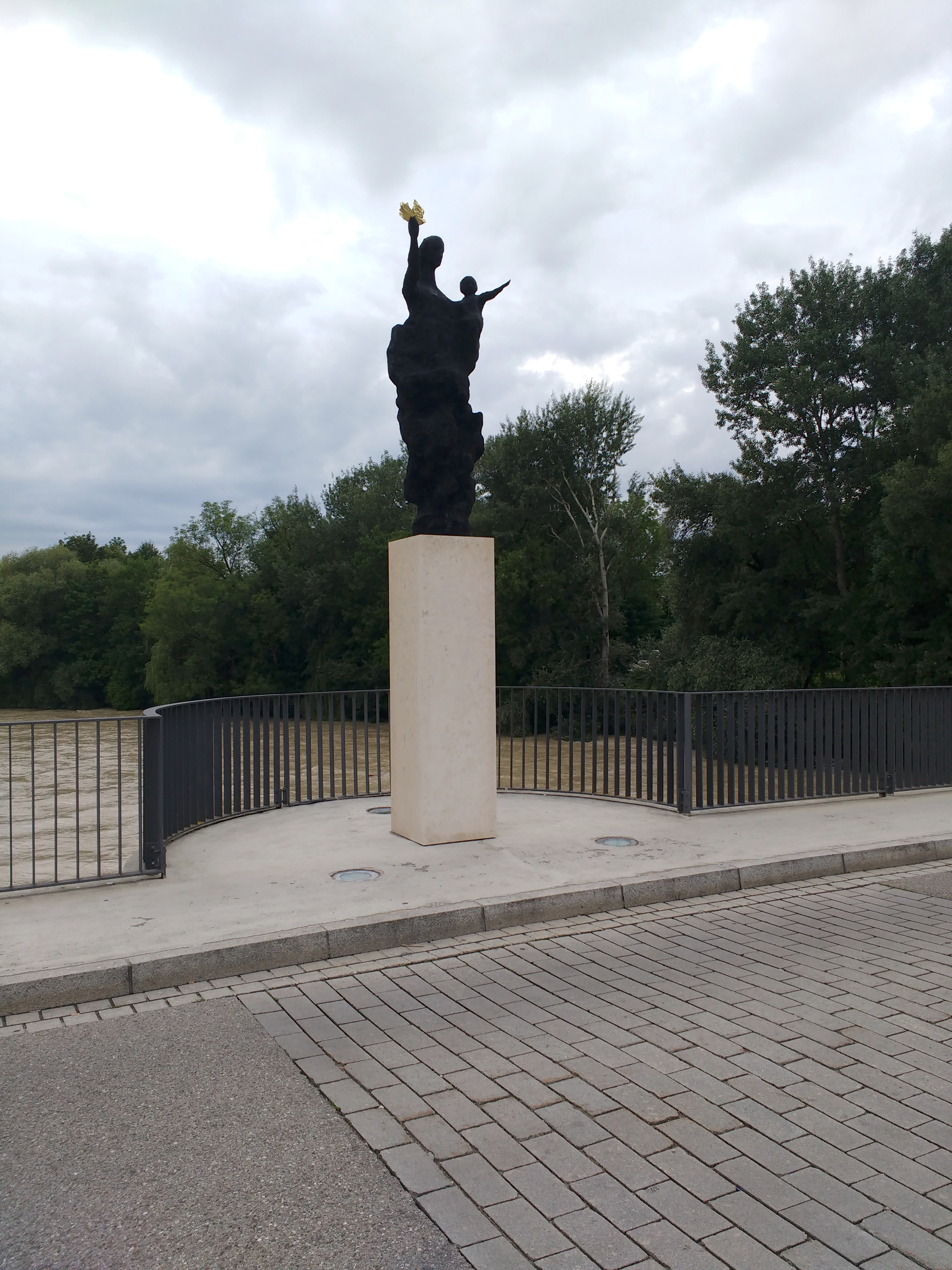 Statue der Patrona Bavariae Korbinianbrücke in Freising, Bildhauerin Carola Heine.